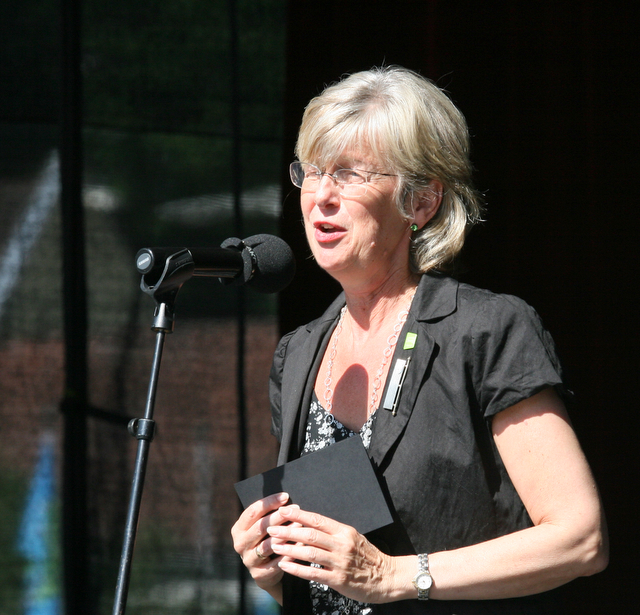 Bjørg Tysdal Moe